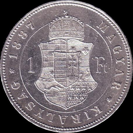 1 forint 1887 - reverse